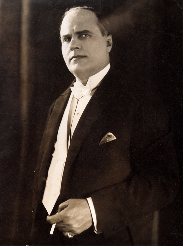 Eduard von Winterstein Privataufnahme